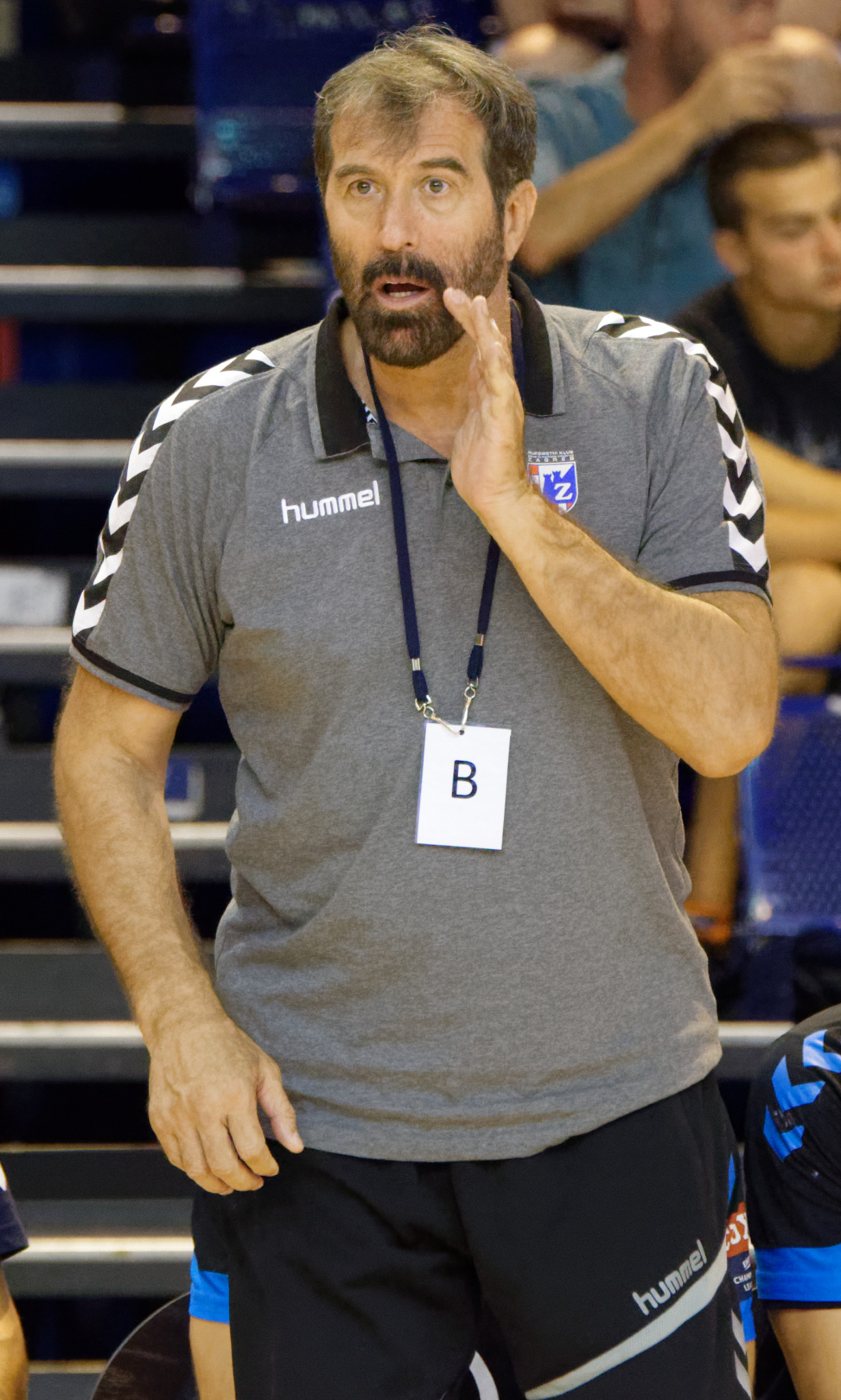 Rencontre du challenge Marrane 2016 entre l'US Dunkerque et les croates du RK Zagreb